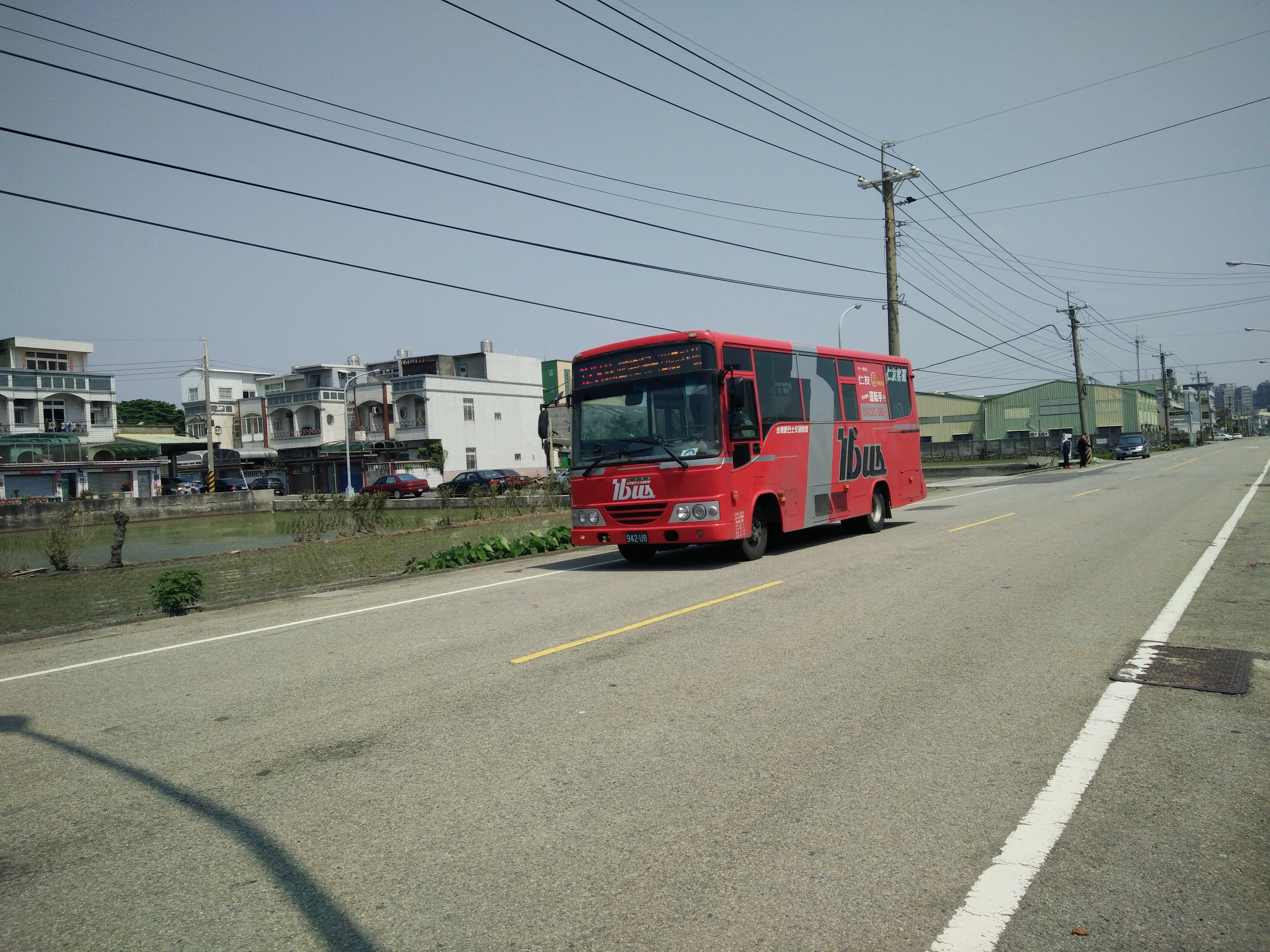 中文（台灣）: 仁友客運Isuzu NQR70PBL中型巴士942-U8營運台中市公車123路，行駛於台中市清水區中社路。